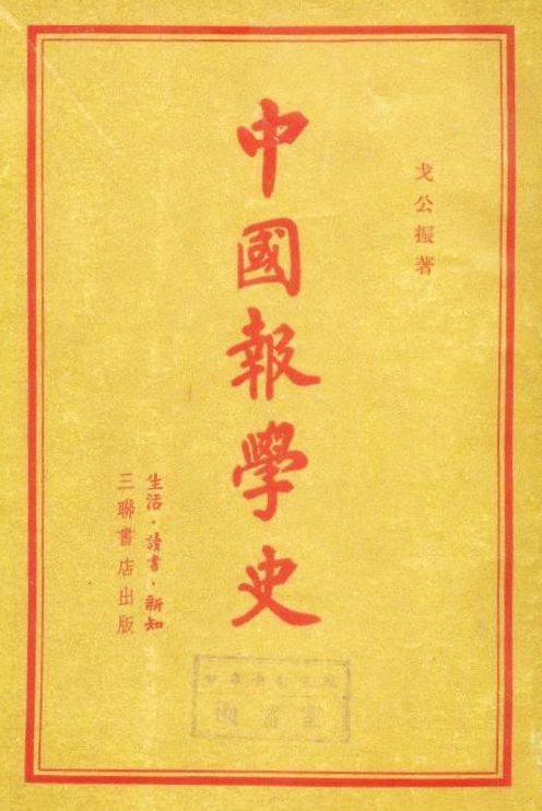 中国报学史，戈公振著，中国新闻史学奠基作品。